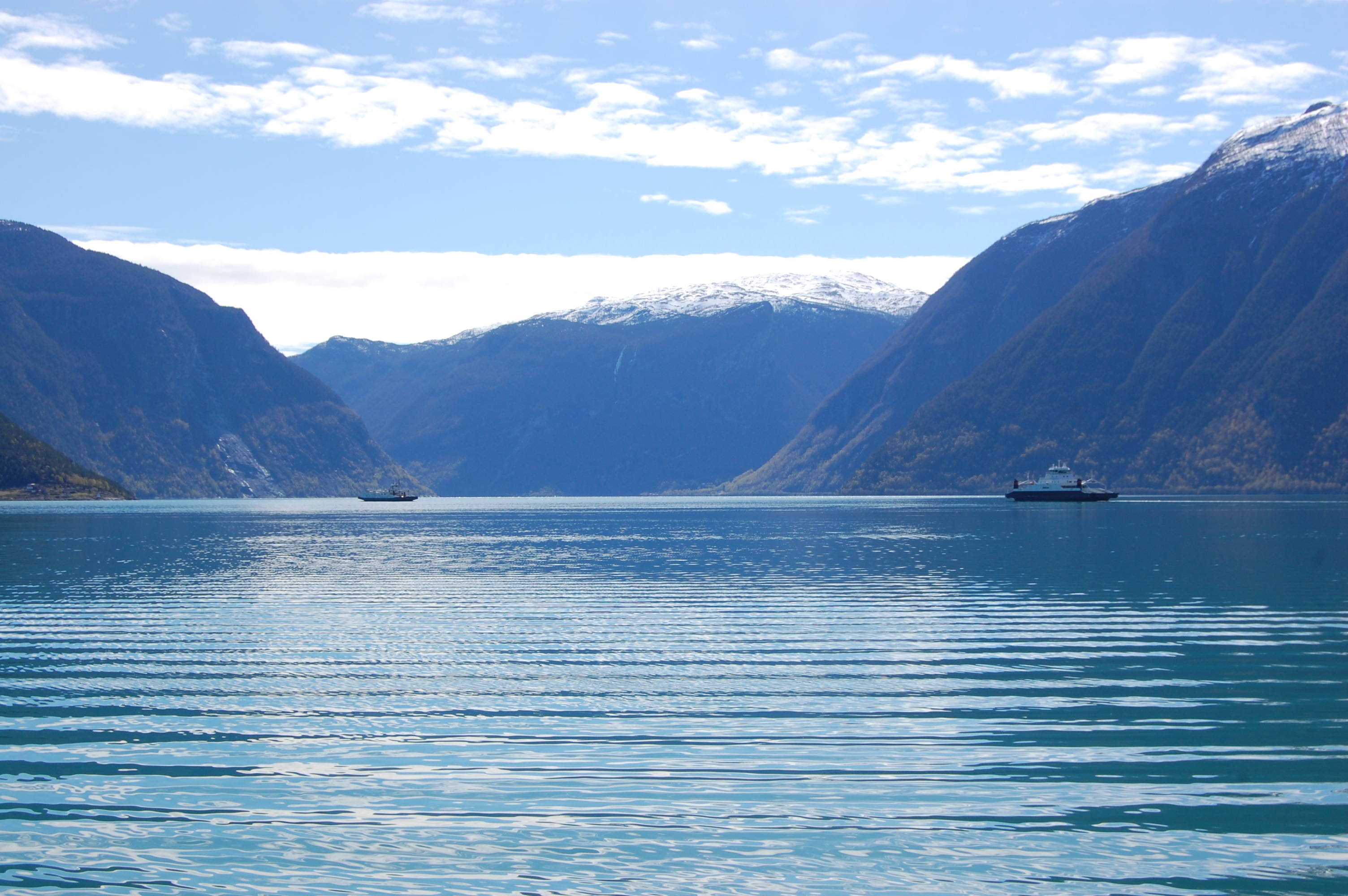 Fergetransport over Sognefjorden. Fergene på fjorden.